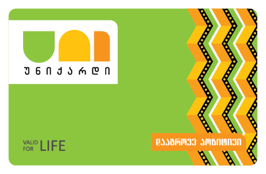 უნიქარდის დაგროვების ბარათი